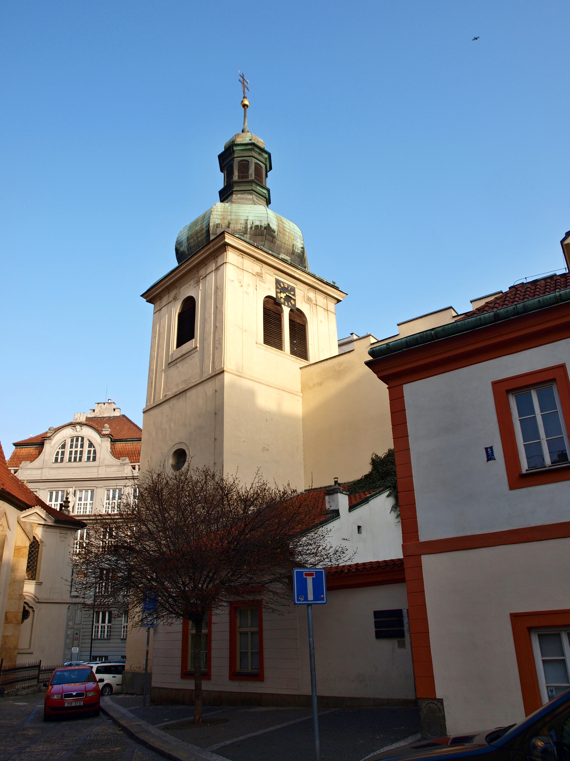 Praha 1-Nové Město, kostel sv. Vojtěcha